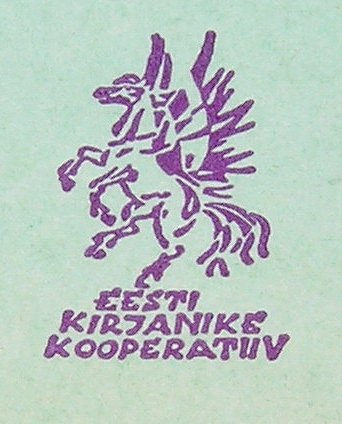 EKK